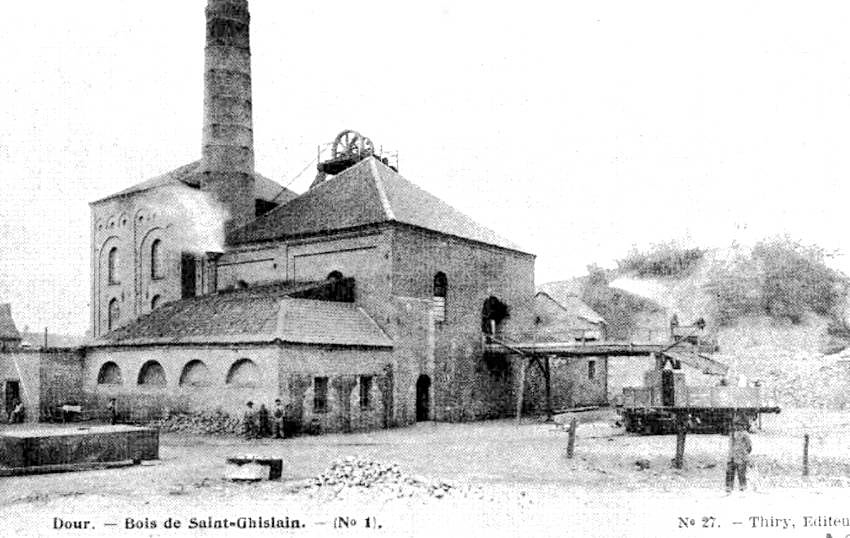 Le puits de Sauwartan à la fin du XIXème siècle.